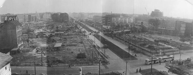 Zentralbild 9. Februar 1952 Nationales Aufbauprogramm Berlin 1952. Blick vom Block C-Nord in der Karl-Marx-Allee auf die Baustellen des Blocks D-Nord (links) und des Blocks D-Süd (rechts).